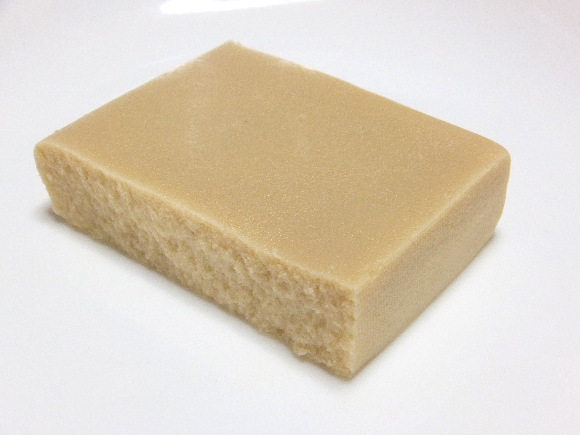 高野豆腐。水で戻した状態 Fujifilm FinePix F770EXR